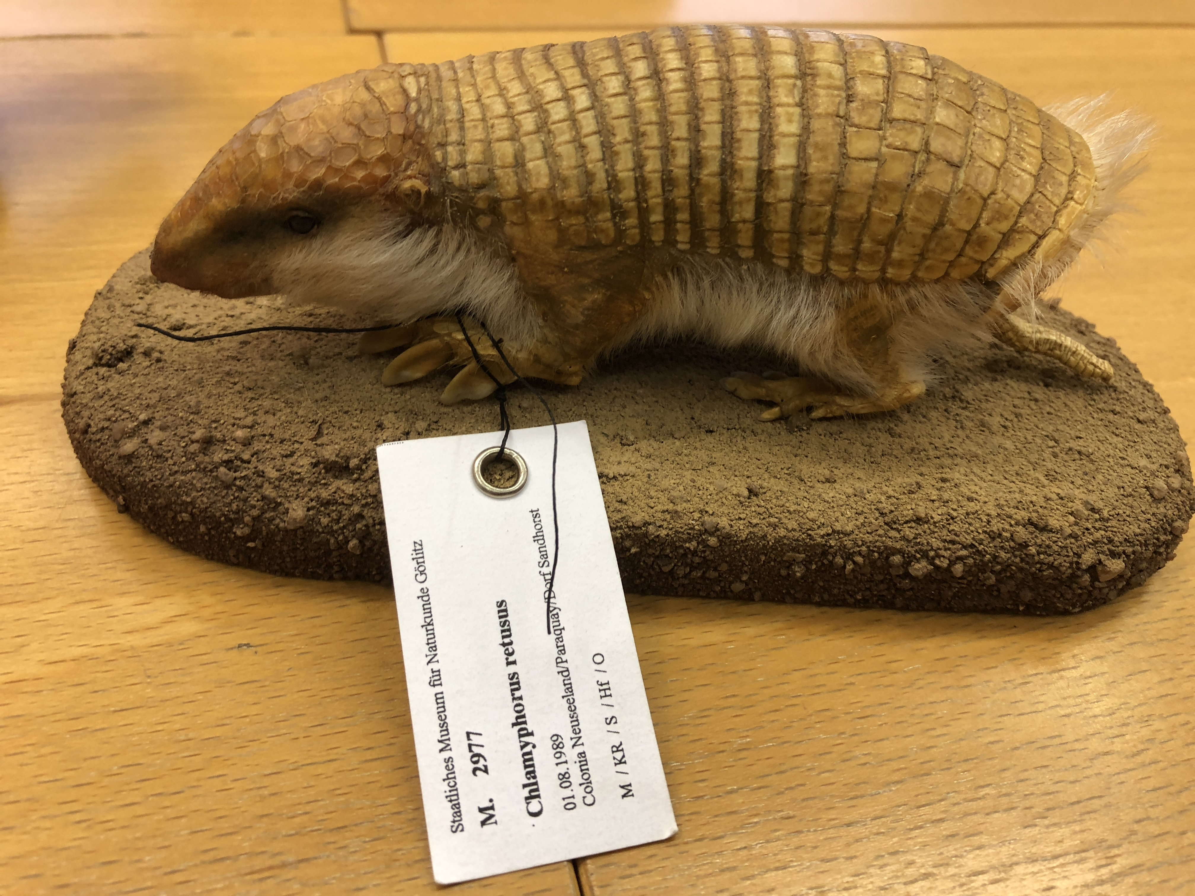 Exponat aus dem Senckenberg Museum für Naturkunde in Görlitz.